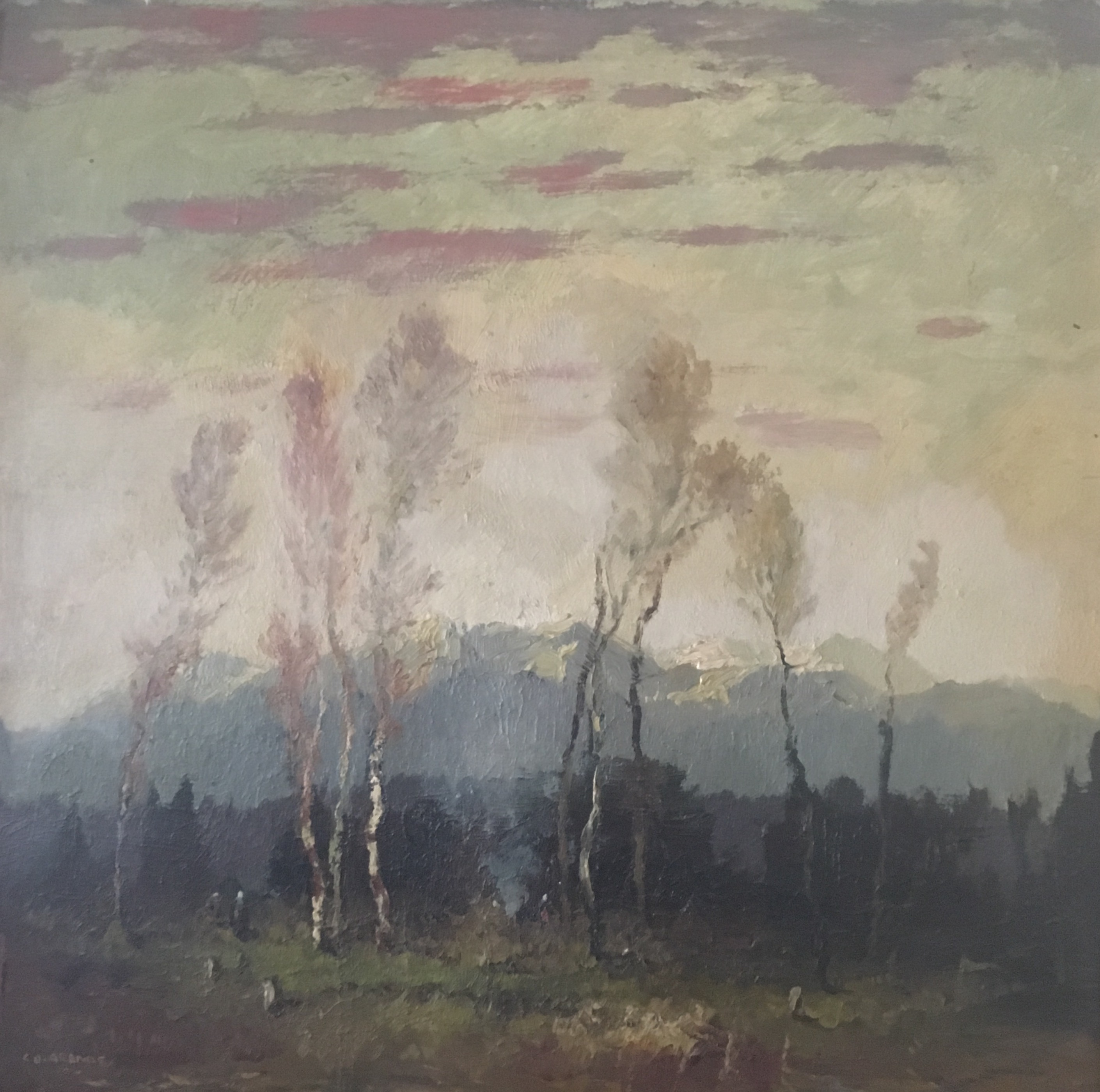 Vor dem Birkenwäldchen arbeiten die Beerensammlerinnen, die sich an einem Torffeuer wärmen, während im Hintergrund die Alpen zu sehen sind.